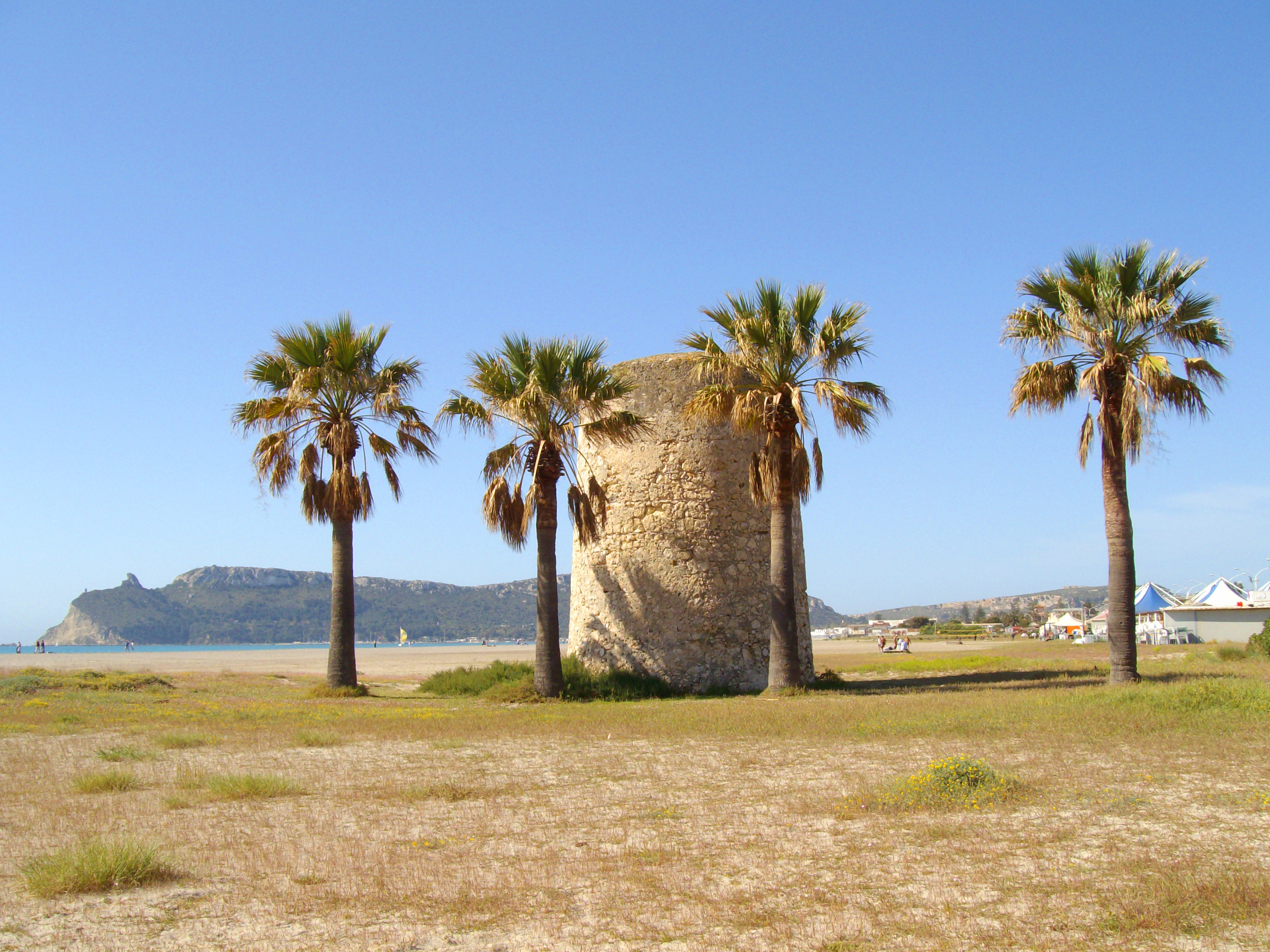 Torre spagnola di Mezza Spiaggia, nella spiaggia del Poetto - Cagliari